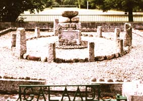 Monument "Galaad" à Ussat les Bains symbolisant cette transmission symbolique d'une fraternité gnostique à une autre